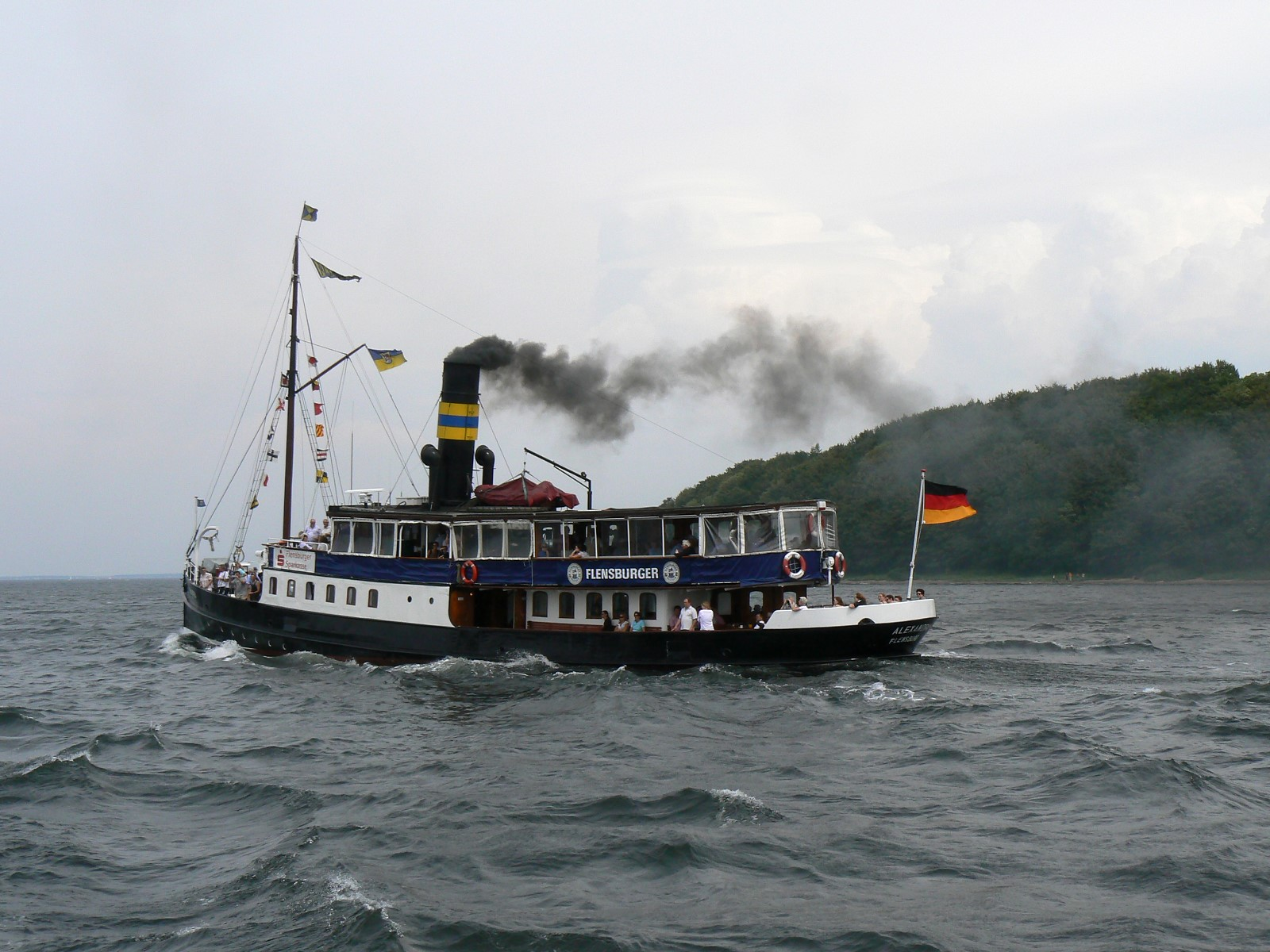 Dampfschiff Salondampfer Alexandra (1908) auf der Flensburger Förde.